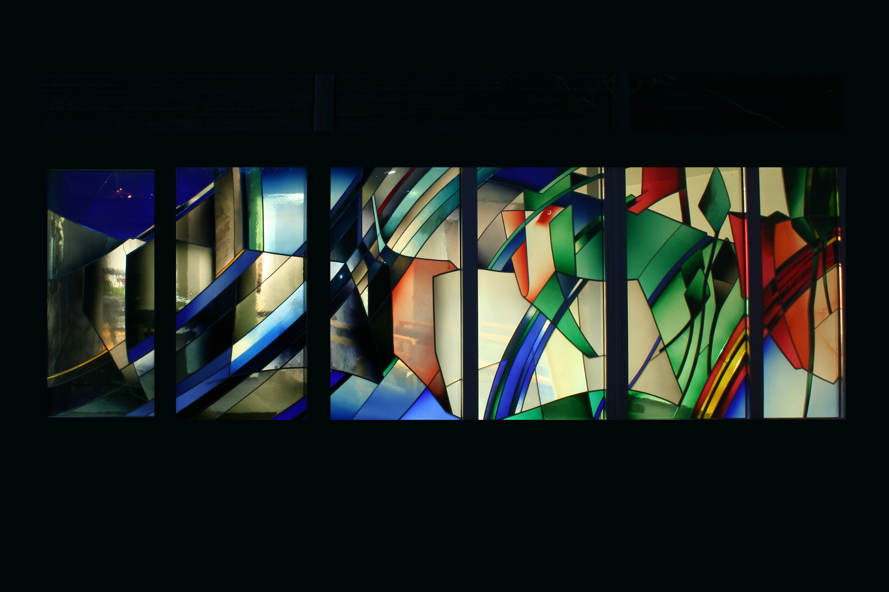 Römisch-katholische Kirche St. Katharina von Siena Fällanden, Schöpfungsfenster von Franco G. Giacomel